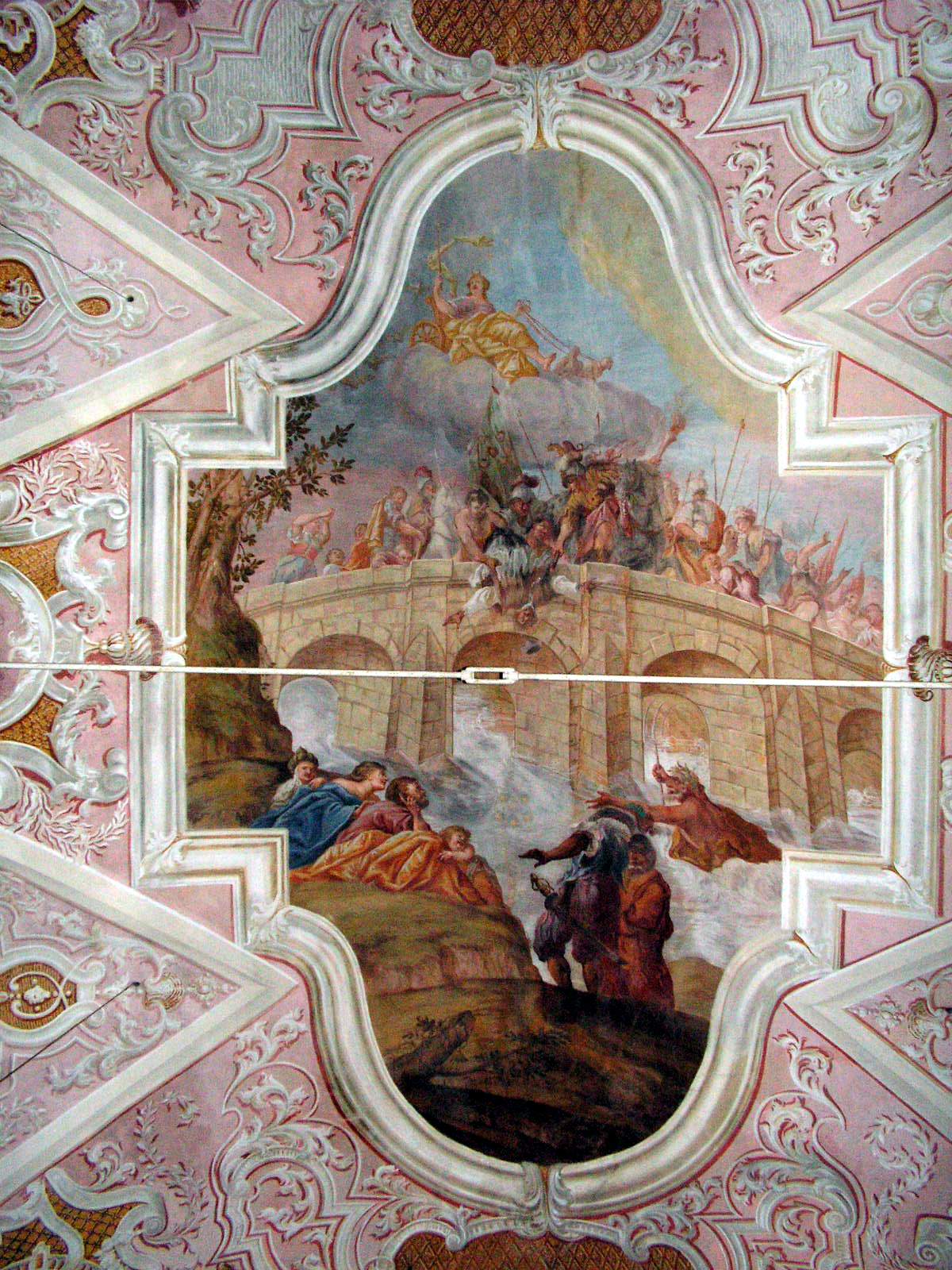 Brückensturz, Martyrium des Heiligen Nepomuk; Deckenfresko von Joseph Anton Merz in der Pfarrkirche Thürnthenning